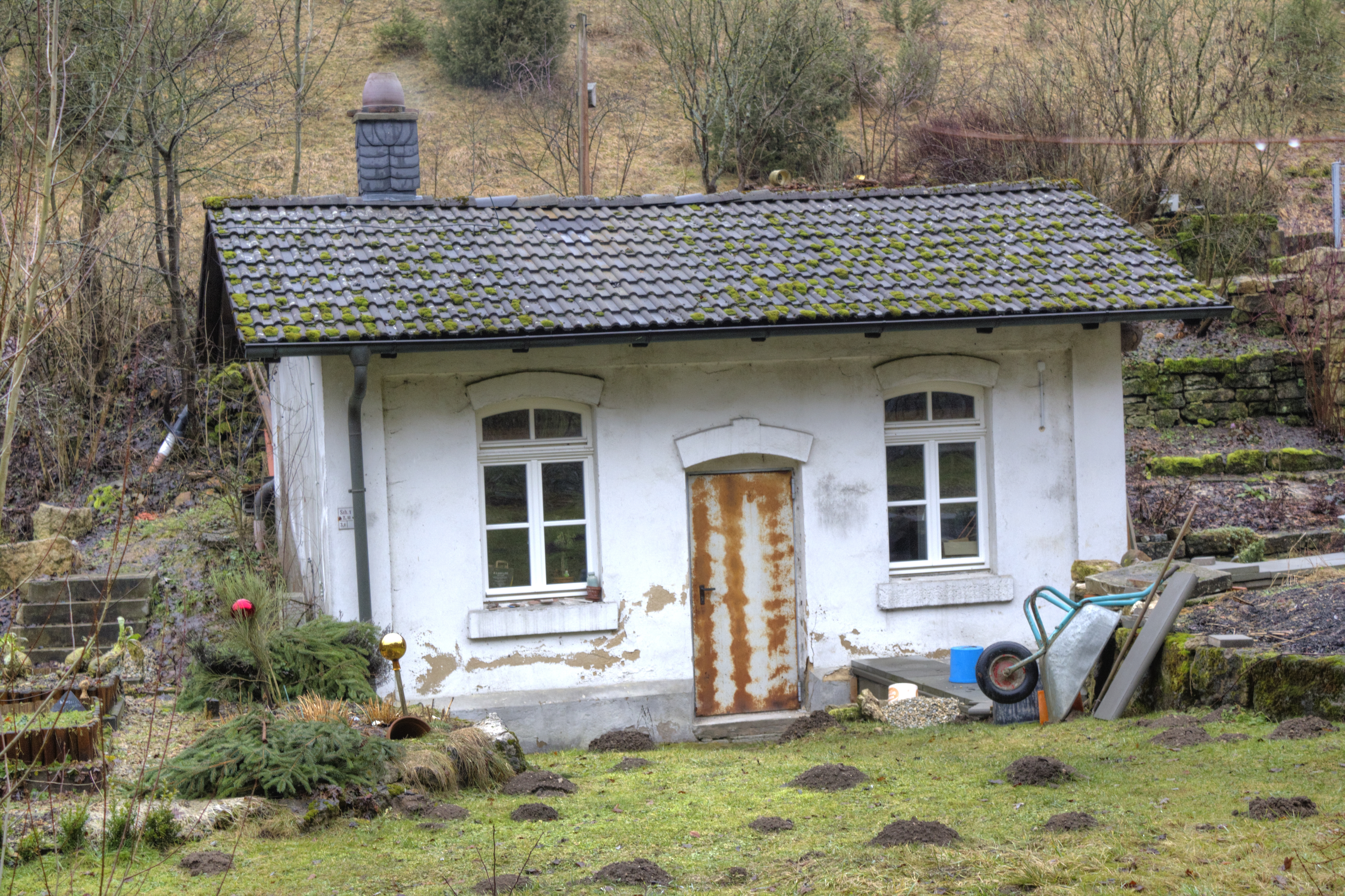 Das 1915 von der Gemeinde Stadelhofen errichtete Pumpenhäuschen